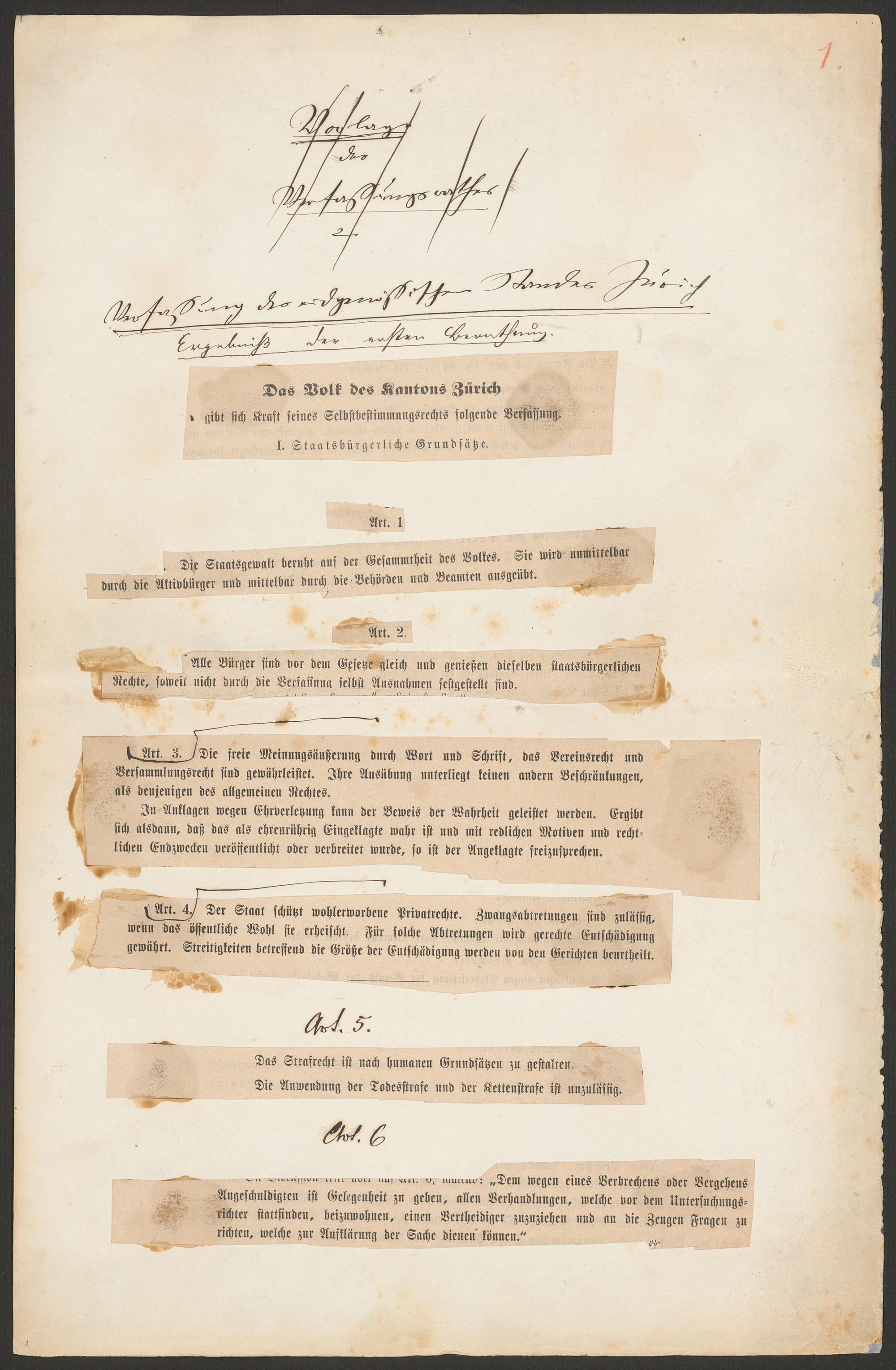 Verfassung des eidgenössischen Standes Zürich: Ergebnis der ersten Beratung, Autor Gottfried Keller, 3.12.1868